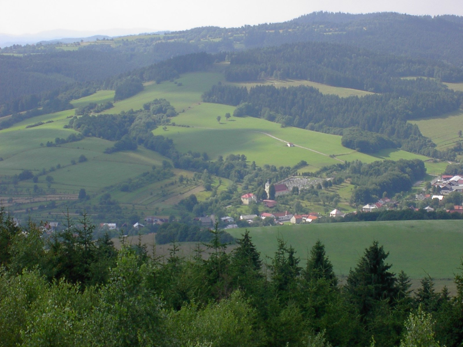 General view to Francova Lhota.